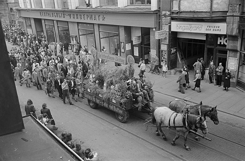 Original image description from the Deutsche FotothekDemonstrationszug, angeführt von einem mit Parolen sowie Ernteerträgen geschmückten Pferdefuhrwerk